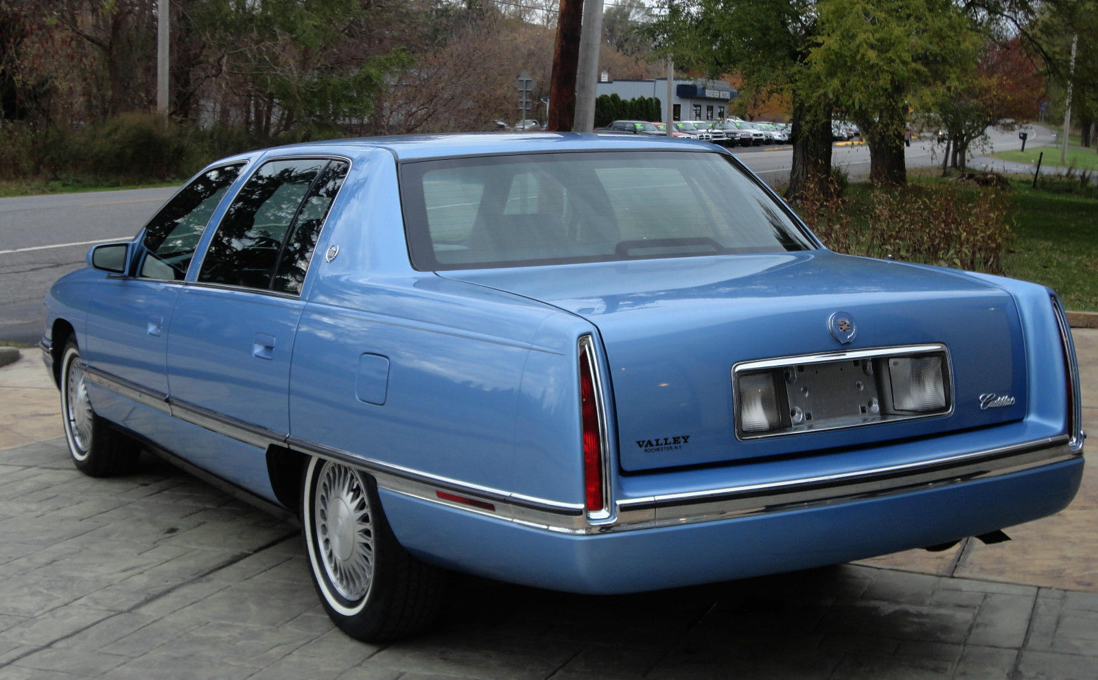 1994 Cadillac DeVille